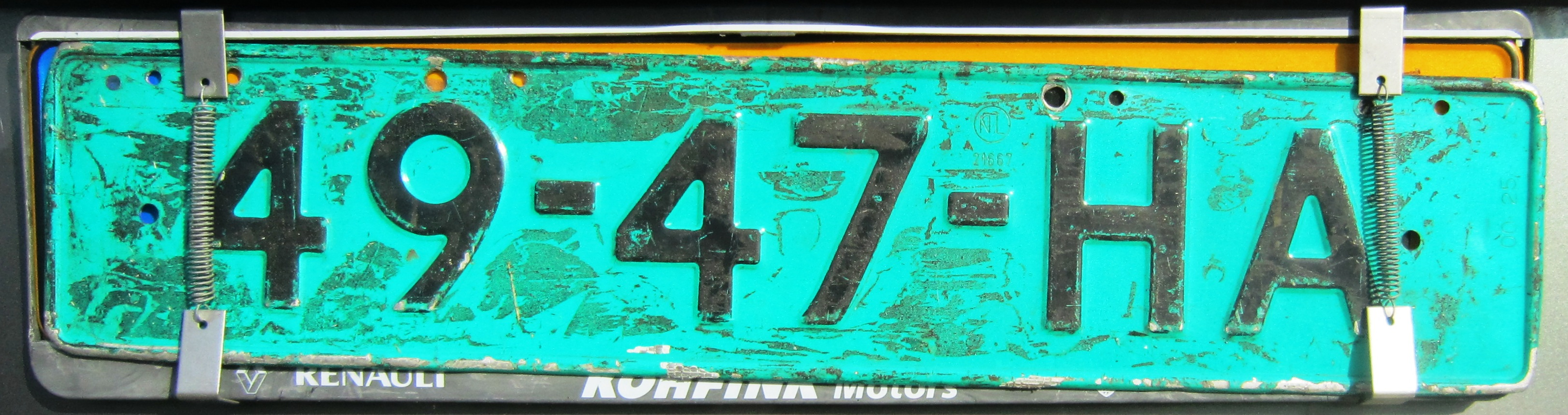 Nederlandse handelaarskenteken nieuw licht groen